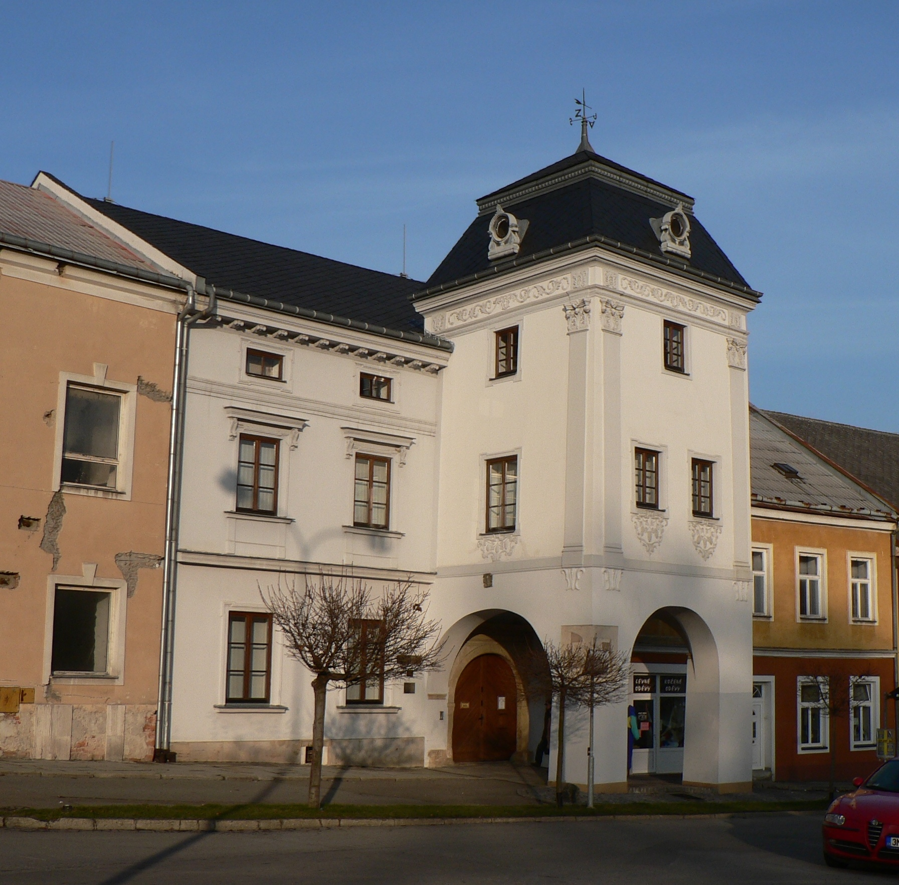 Renesanční dům, Masarykovo náměstí 15/14, Žižkova 12/1, dnes muzeum.